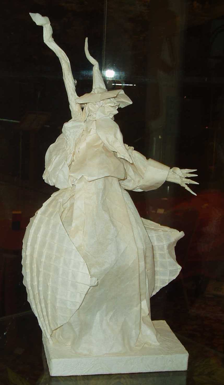 גנדלף